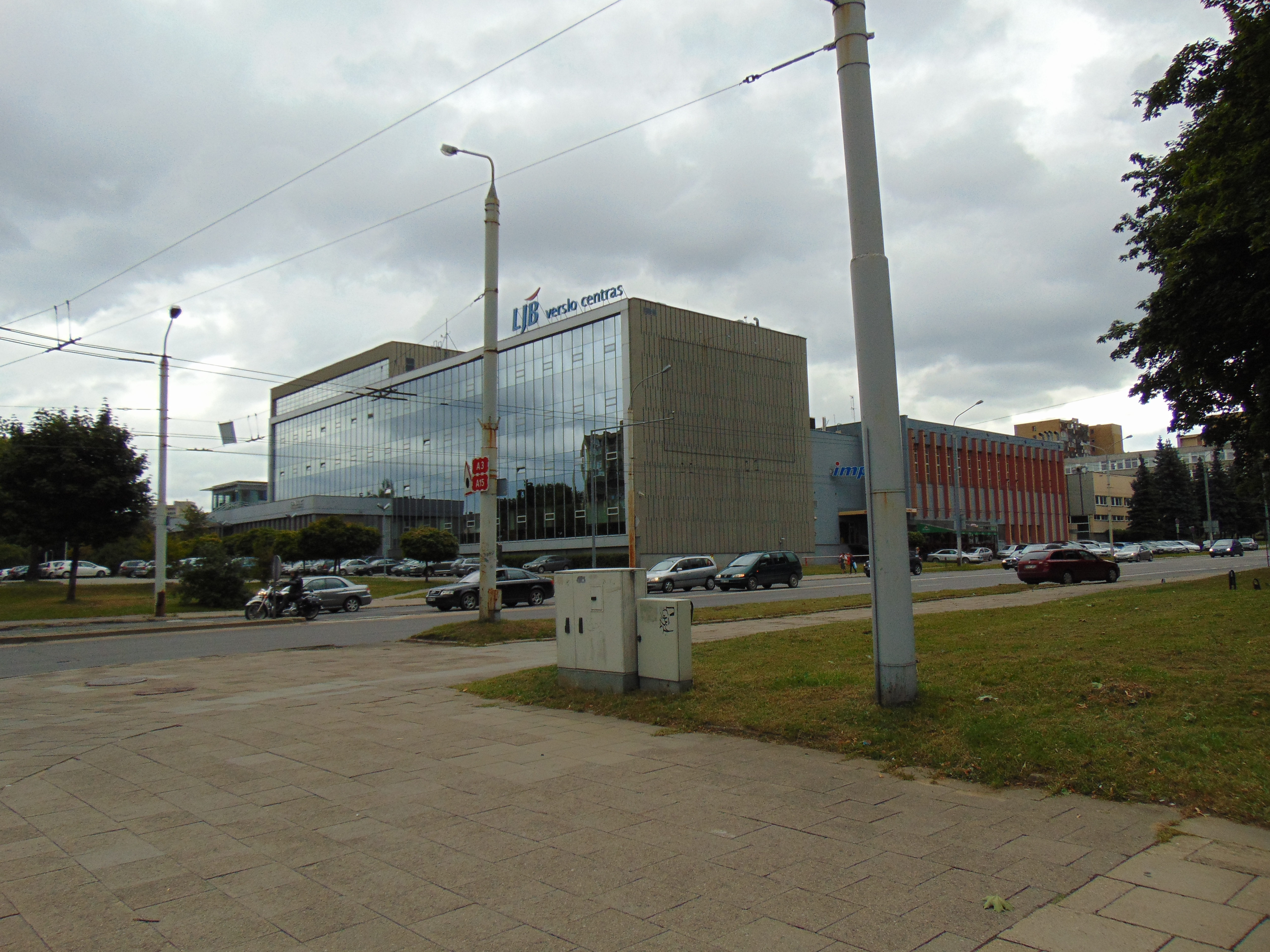 Lietuvos telekomas